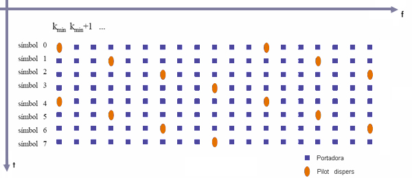 Gràfic del patró de pilots número 1